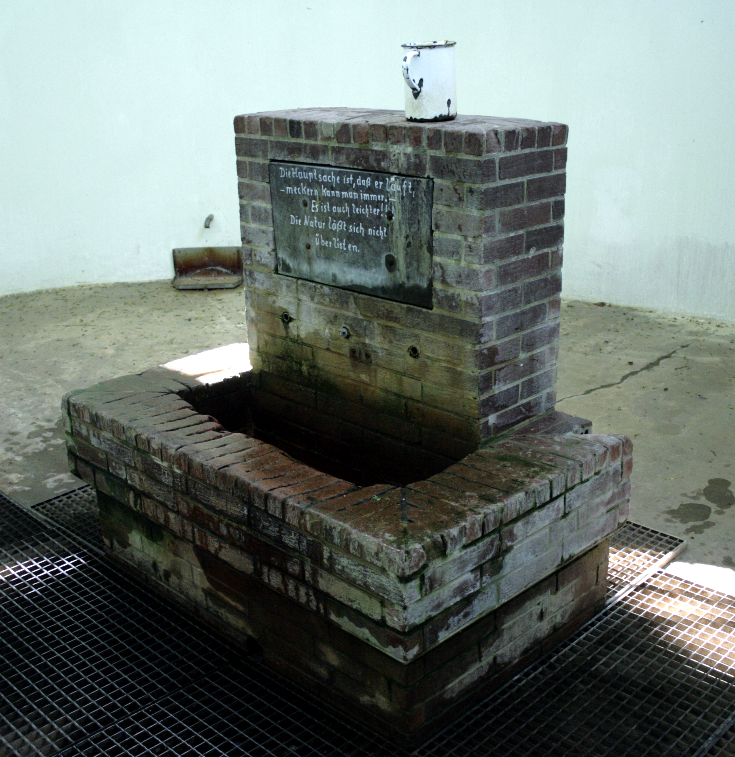 Mineralquelle "Sauerborn" bei Lindenholzhausen, Deutschland